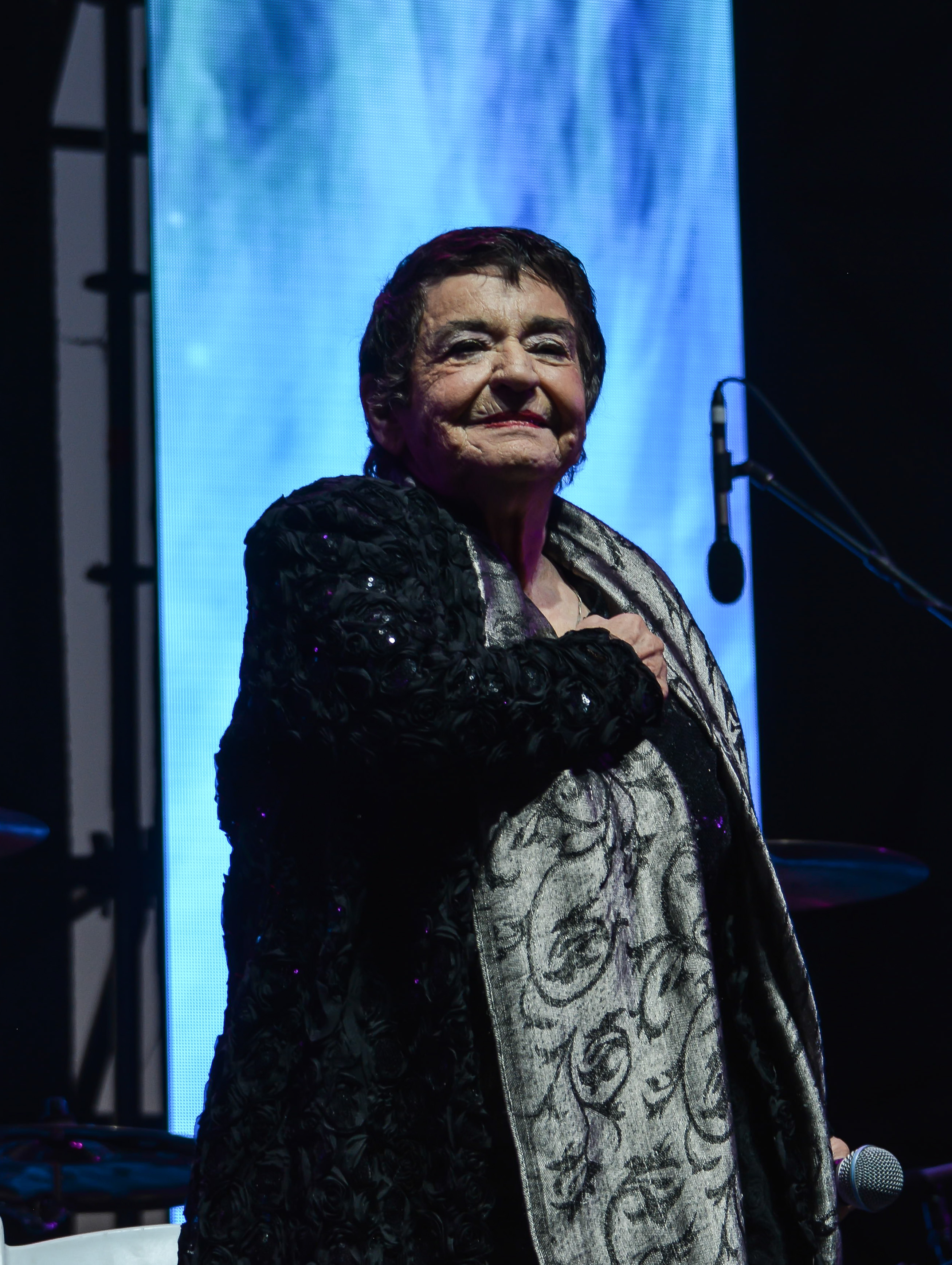 Cecilia en la Cumbre del Rock Chileno 2018, Santiago, Chile